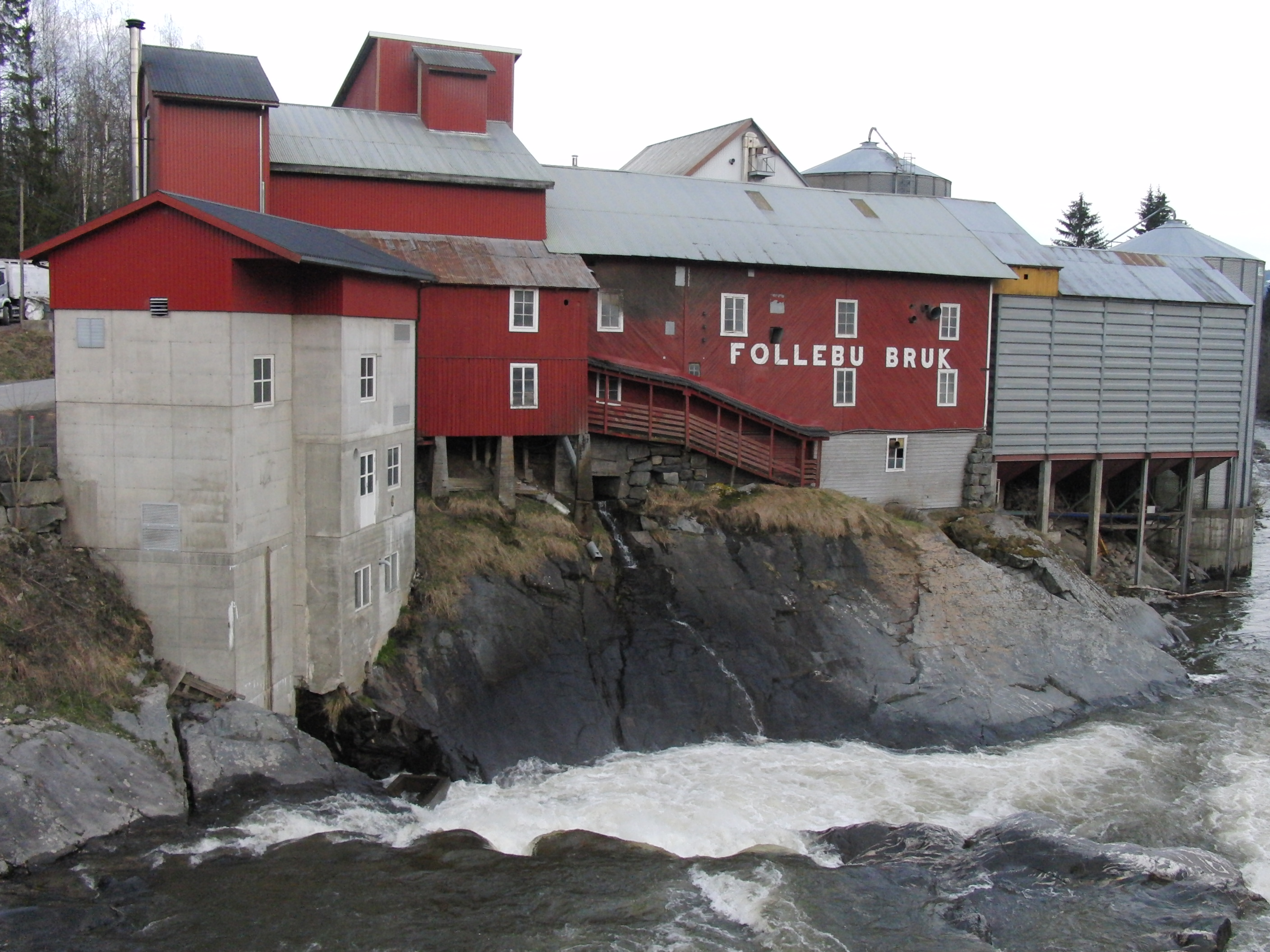 Follebu bruk kraftverk